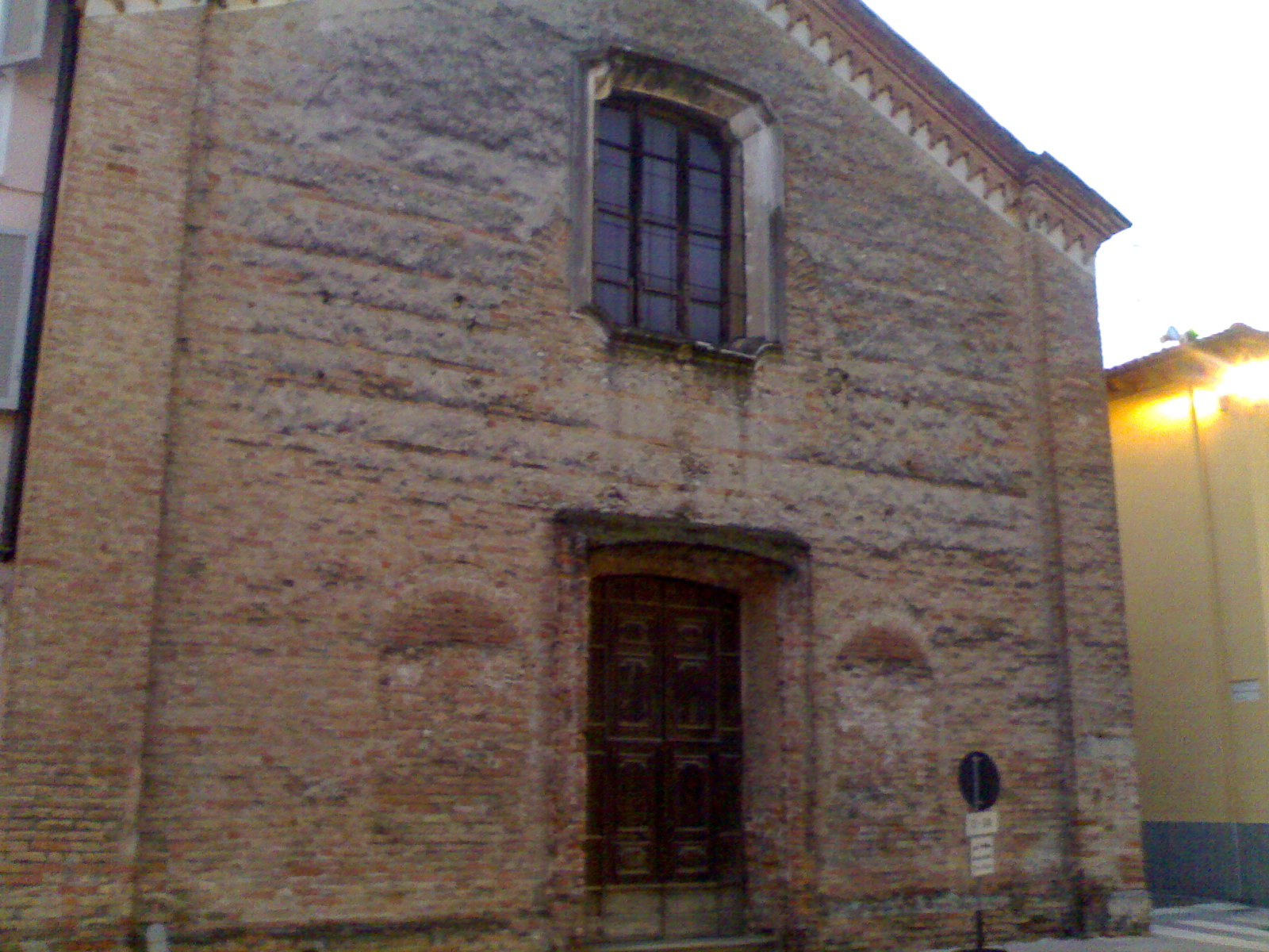 Chiesa di Santa Maria Immaccolata a Rivolta d'Adda, foto scattata da me.